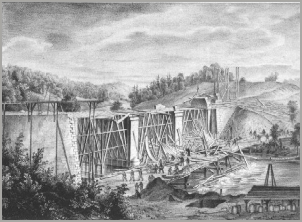 Einsturz des Baugerüsts der Tiefenaubrücke am 11. Juni 1847